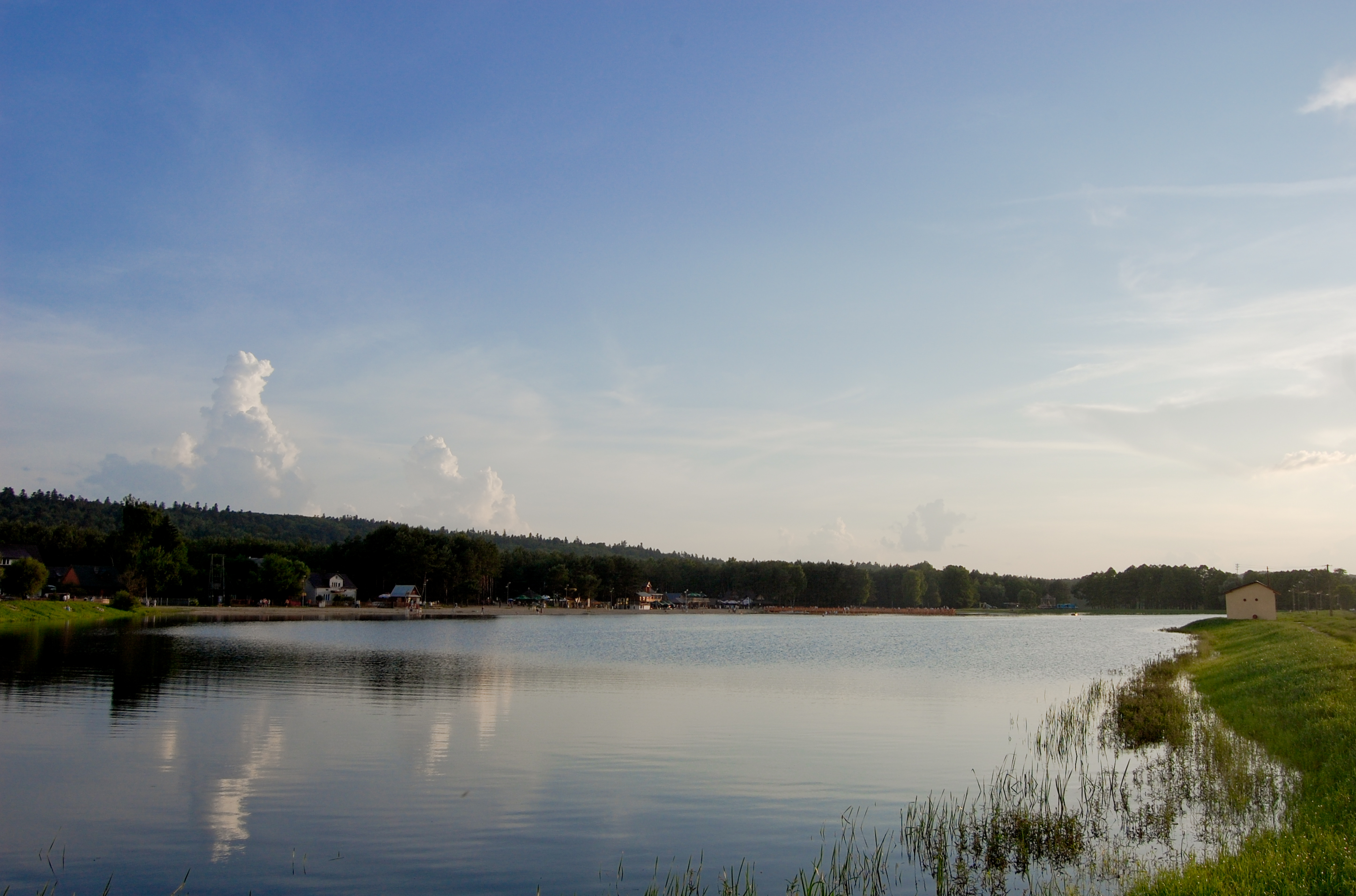 Widok na plażę i pomost nad zalewem w Krasnobrodzie.